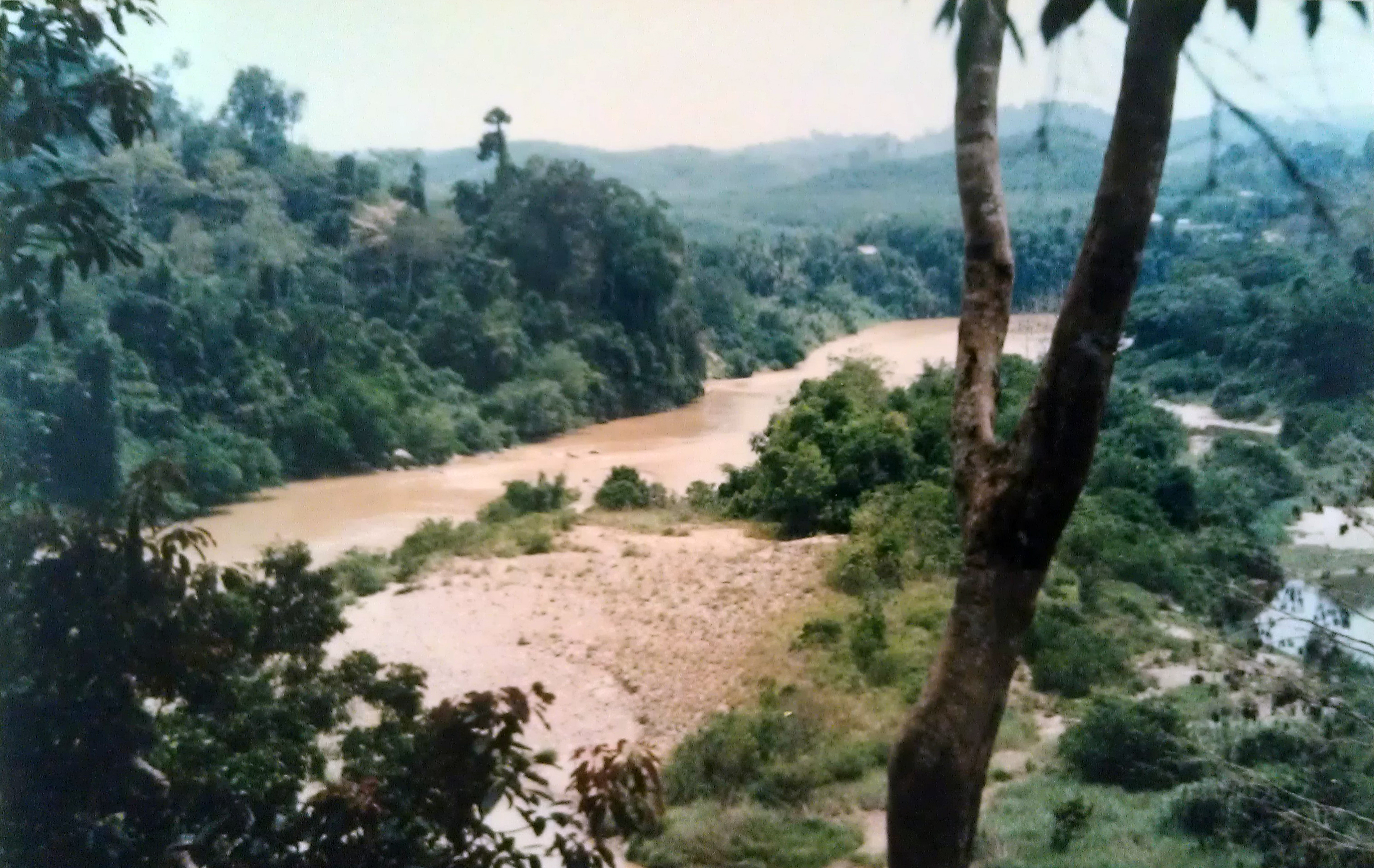 View of Sungei Tembeling from Taman Negara National Park, Malaysia.